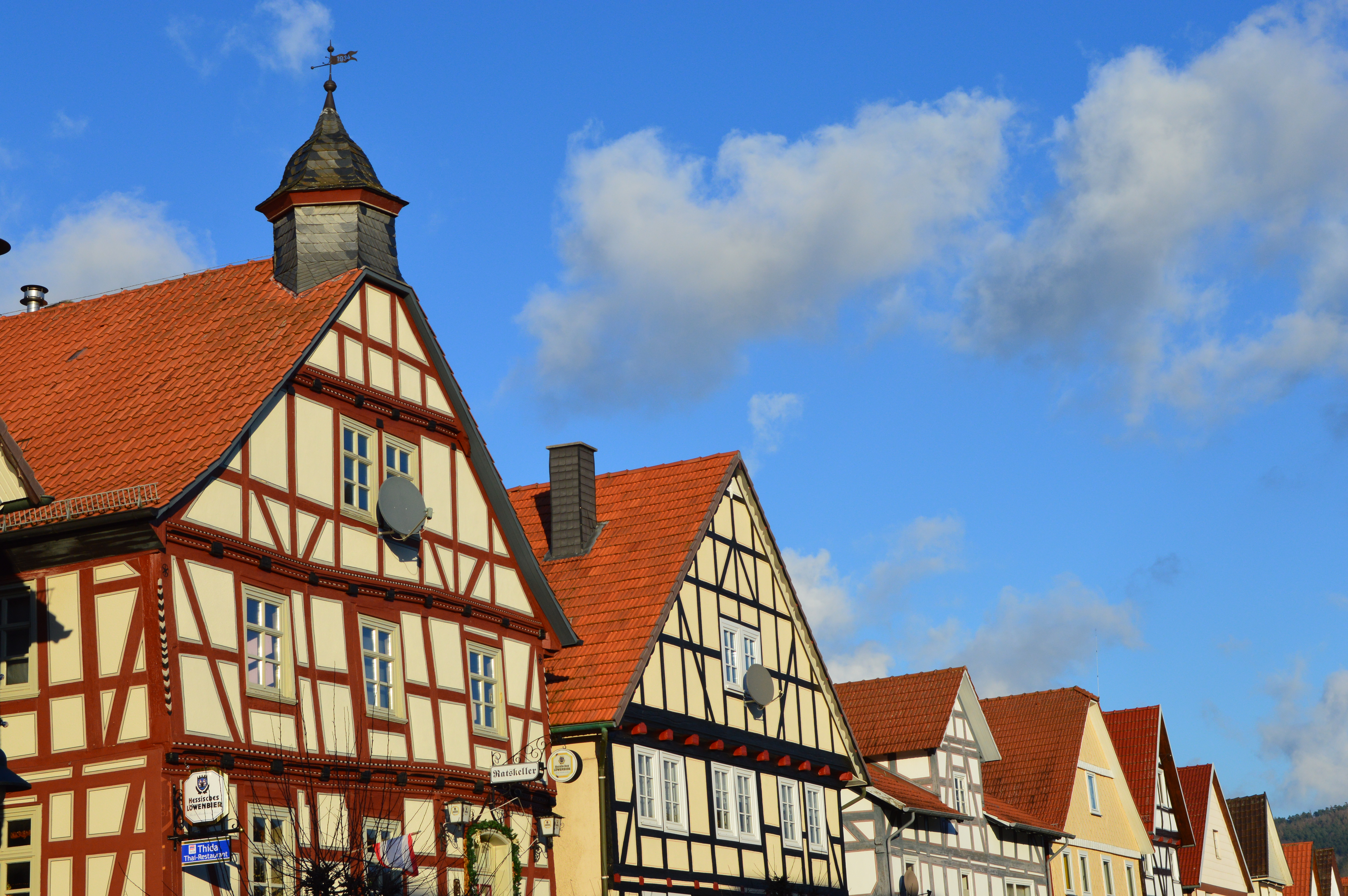 Neumorschen Hausreihe auf der Marktstraße von Rathaus ausgehend